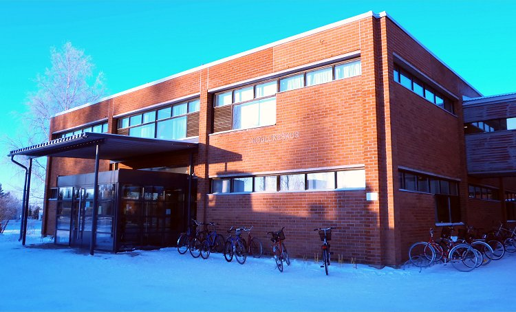 Kokemäen lukion sisäänkäynti.